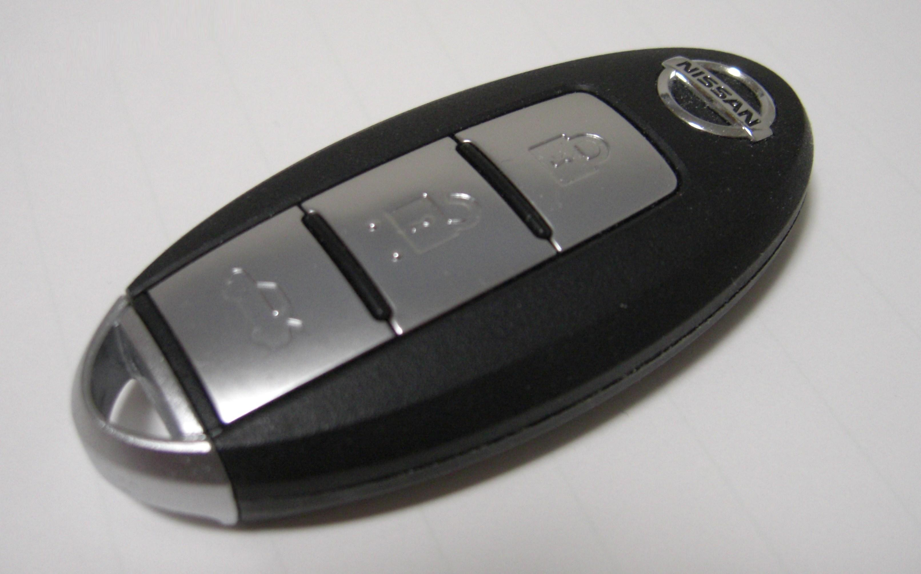 Intelligent key(NISSAN FUGA)